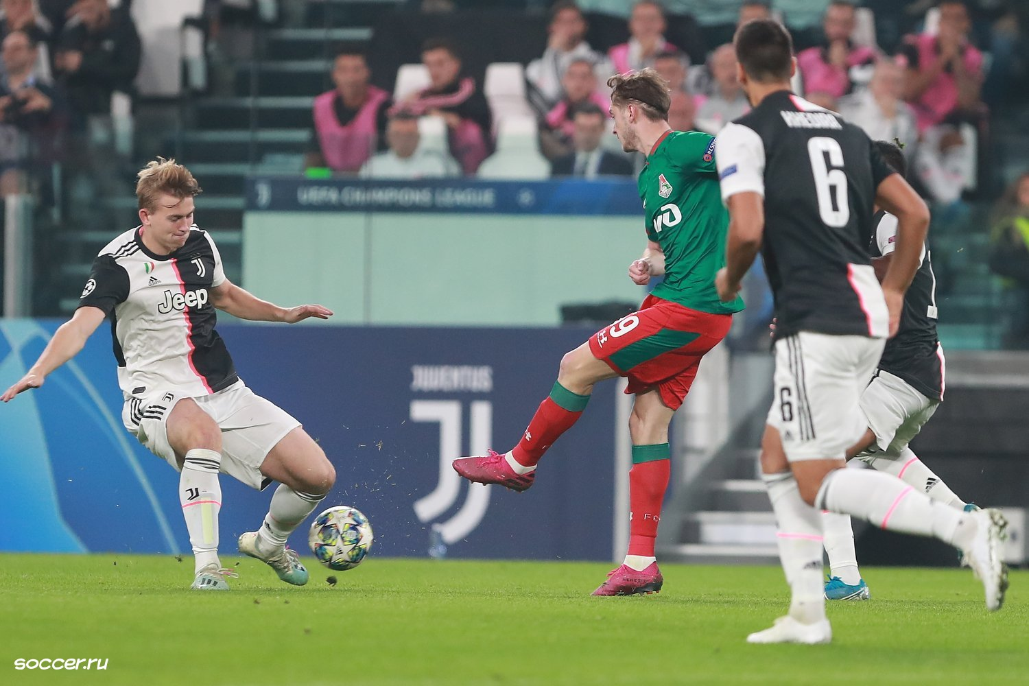 De Ligt na Juventus em 2019